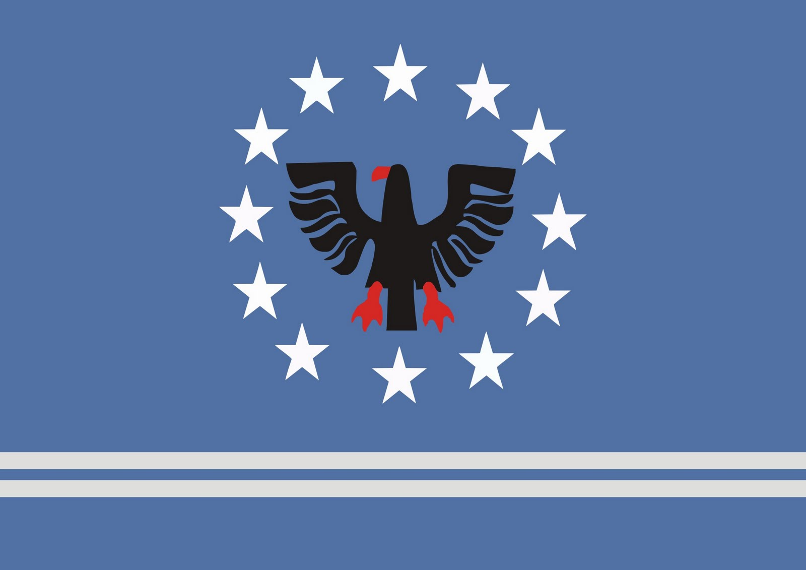 bandeira da cidade de dias davila